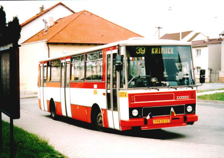 Autobus v Plzni